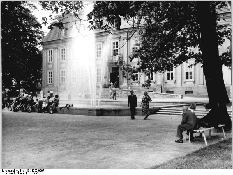 Berlin, Tierpark, Schloss Friedrichsfelde Zentralbild Schwadten-Weiß 26.7.1955 Ein Tierpark für Berlin entstand. Am 2.7.1955 wurde im Schloßpark Friedrichsfelde der Berliner Tierpark durch den Oberbürgermeister Friedrich Ebert eröffnet. Der Tierpark entstand durch eifrige freiwillige Aufbauarbeit der Berliner Bevölkerung und wurde durch Mittel der Bärenlotterie und aus einer Tierpark-Lotterie unterstützt. Berliner Betriebe, Schulen, Zeitungen und befreundete Tiergärten des In- und Auslandes schenkten dem Tierpark die besten Tiere. UBz: Das Schloß Friedrichsfelde mit Springbrunnen.